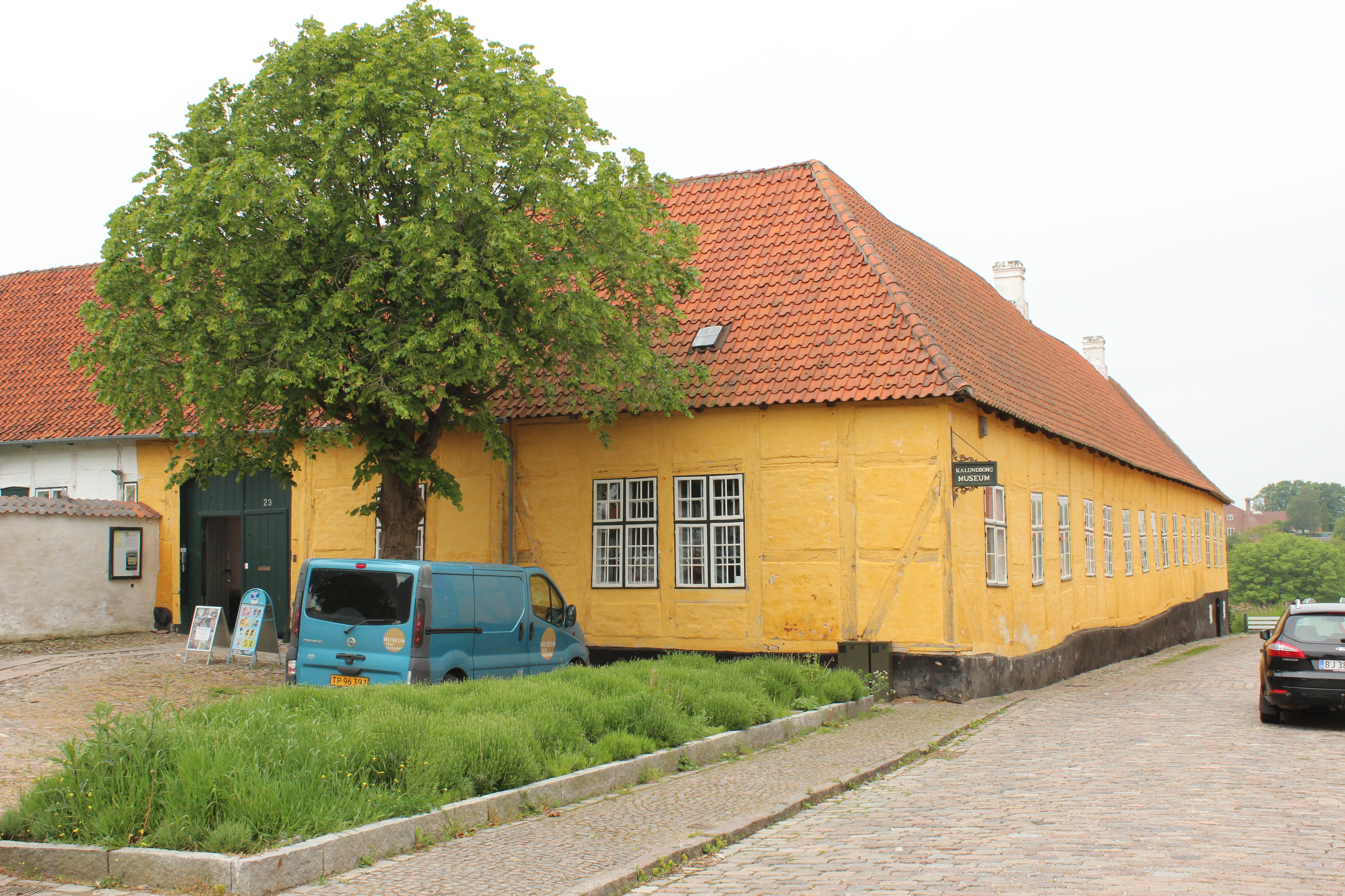 Museet befinder sig i Lindegaarden.